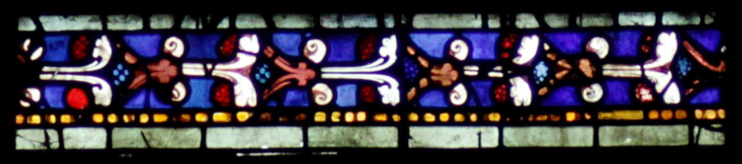 Vitrail des miracles de la Vierge à Chartres